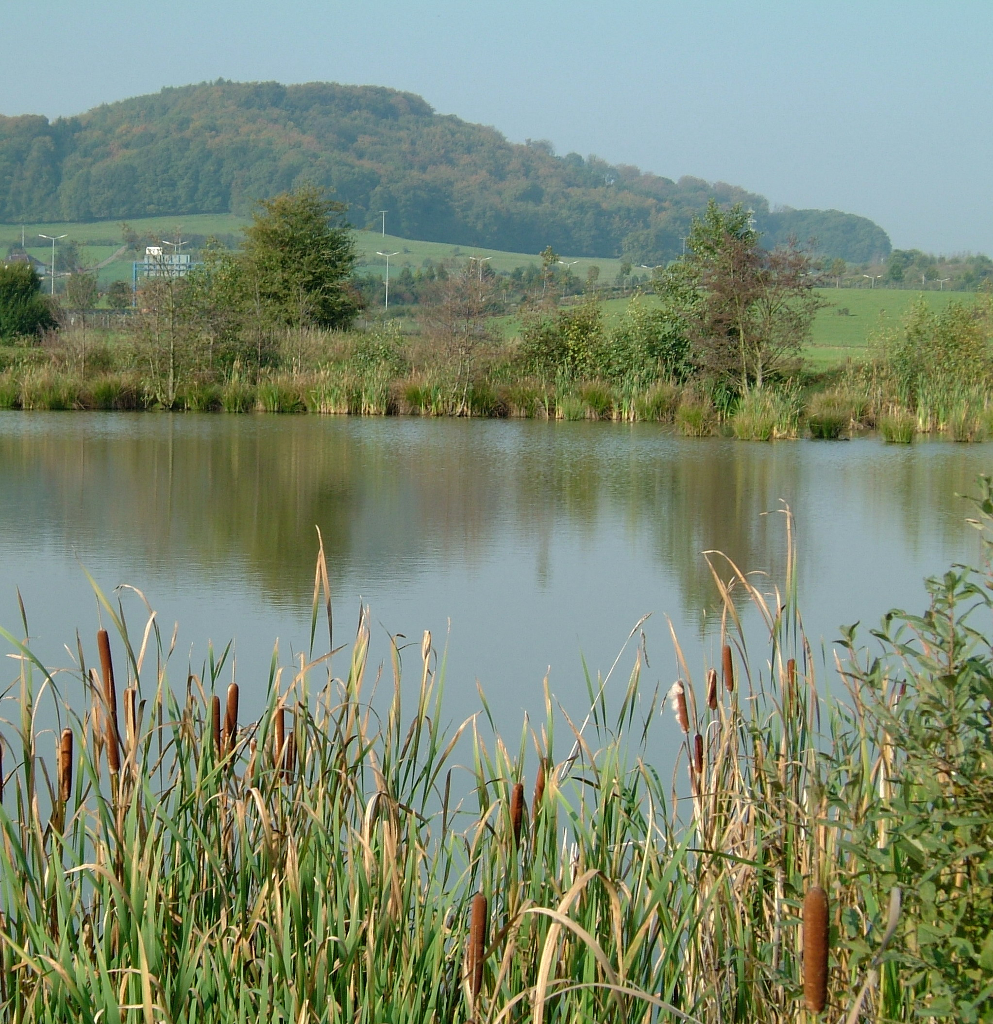 Weimeschköppchen an der Gemeng Keel